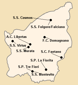 Répartition des clubs Serie A1 en 1990-1991.